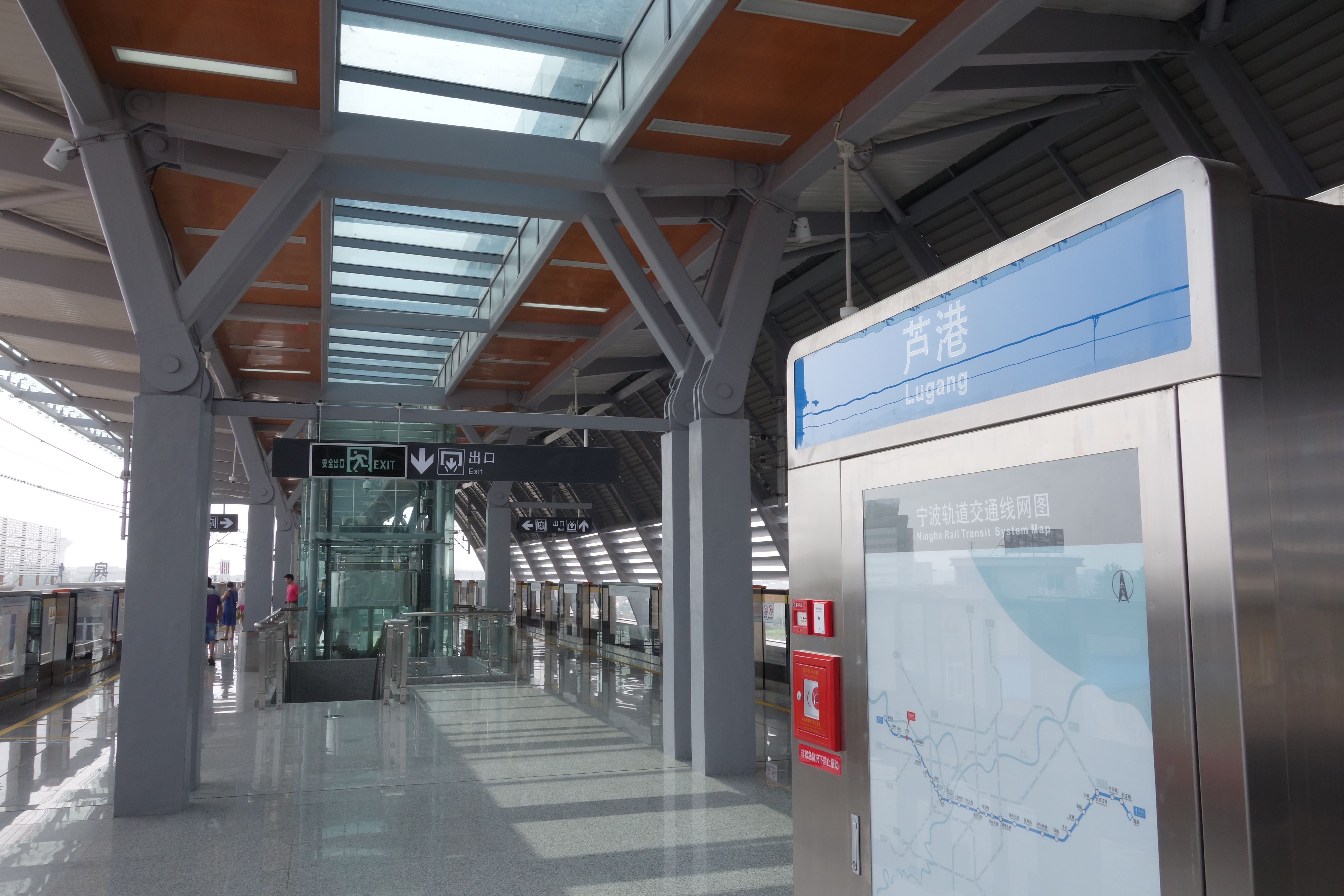 芦港站站台